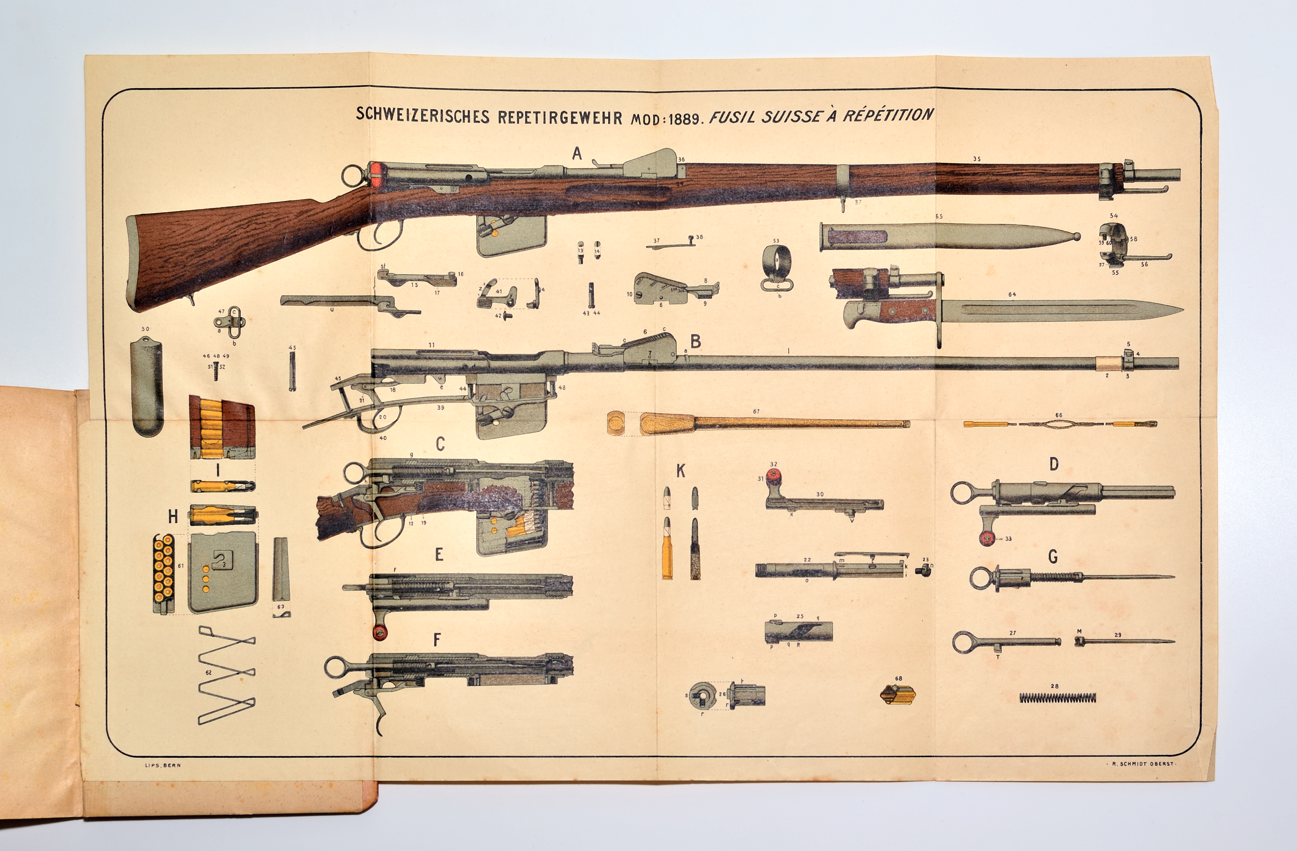 Planche du réglement "Instruction sur la connaissance et l'entretien du fusil à répétition Modèle 1889" dessinée par Rudolf Schmidt